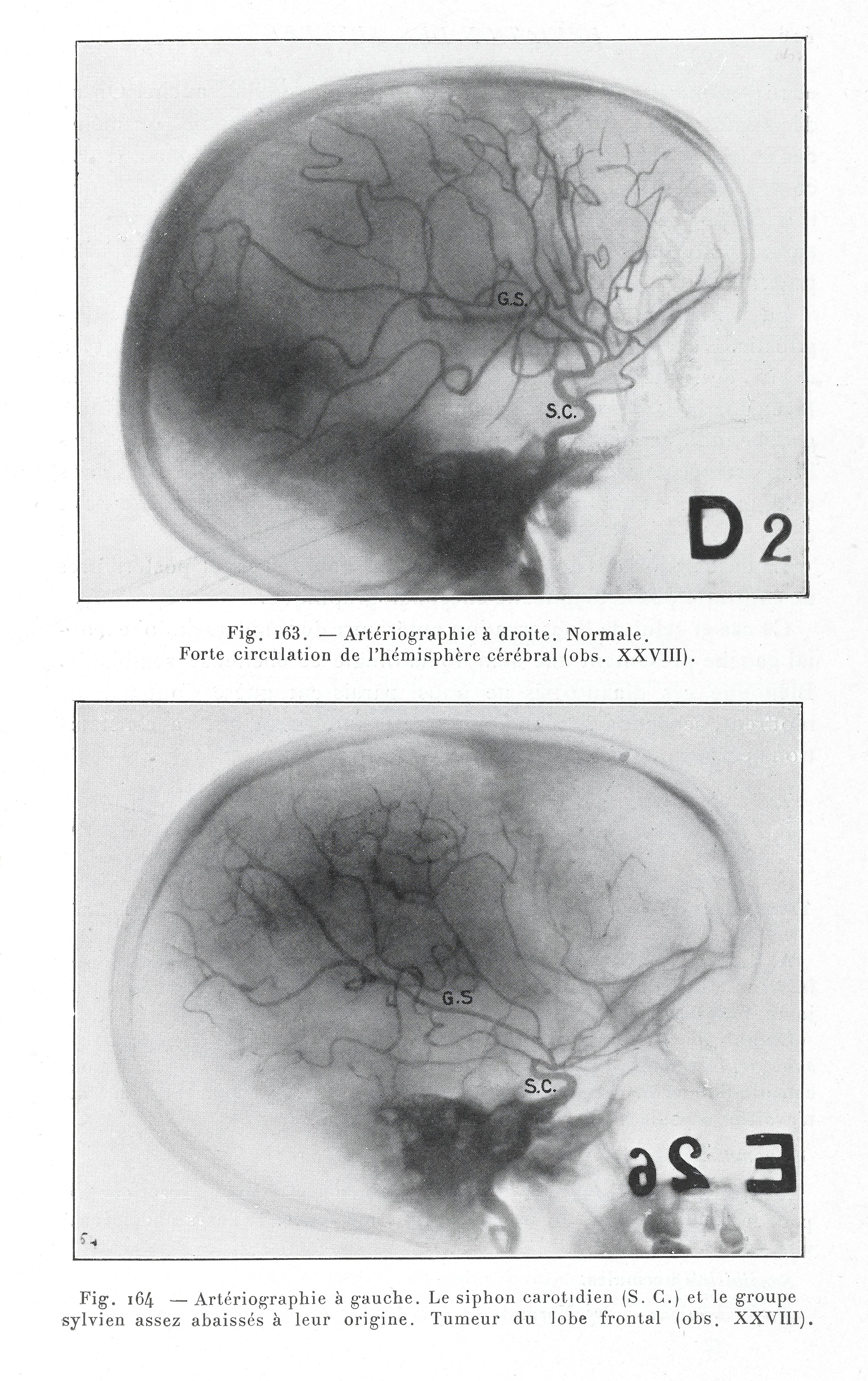 fig 163 - Arteriographie a droite. Normale. Forte circulation de l'hemisphere cerebral (obs xxv111). fig 164 - Arteriographie a gauche. Le siphon carotidien (S.C) et le groupe sylvien assez abaisses a leur origine. Tumeur du lobe frontal (obs xxv111). Wellcome Images Keywords: Brain Neoplasms; Arterial disease; Egas Moniz